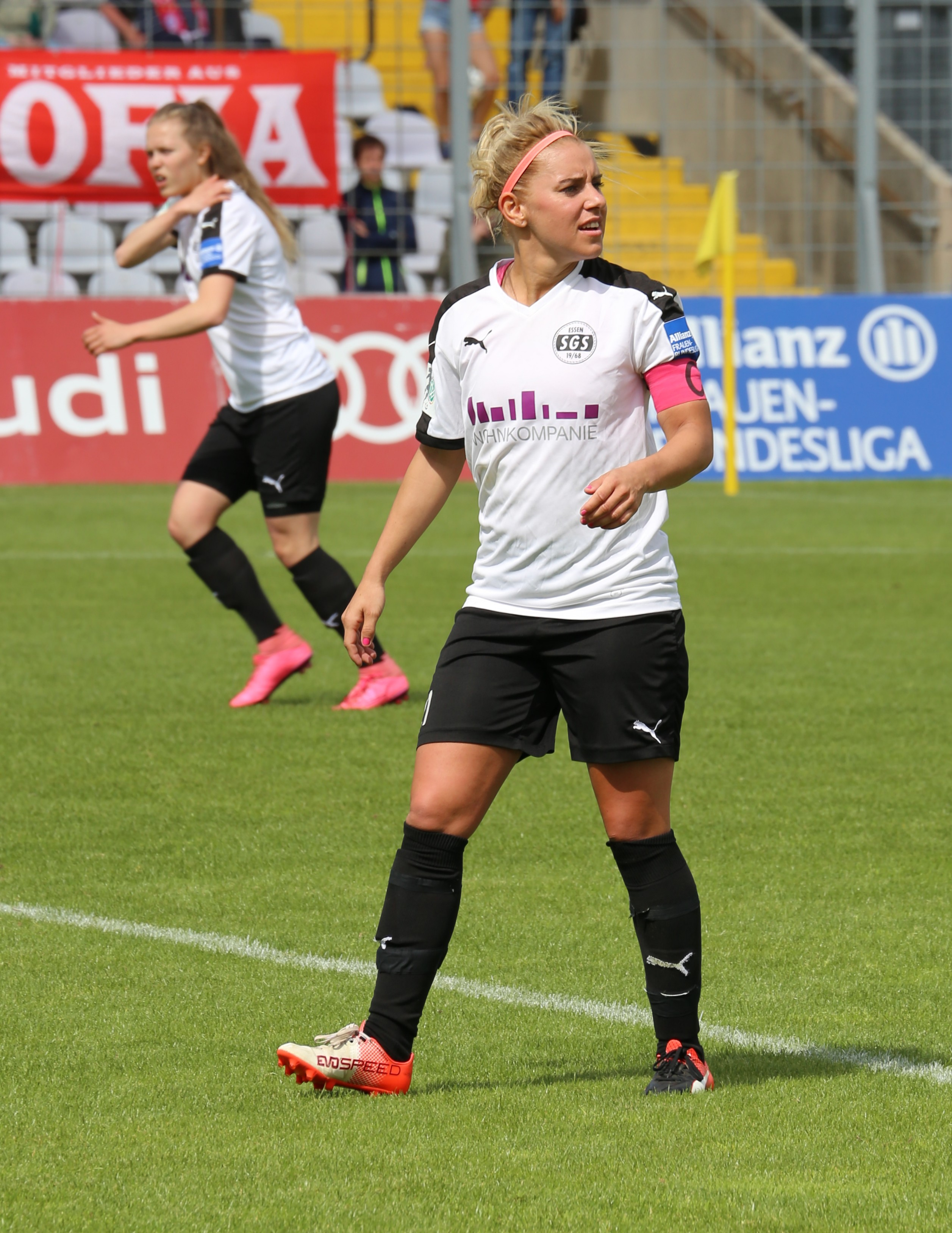 Ina Lehmann (SGS Essen) beim Frauen-Bundesliga-Spiel FC Bayern München gegen SGS Essen am 21. Mai 2017 im Stadion an der Grünwalder Straße (Ergebnis war 2:0)